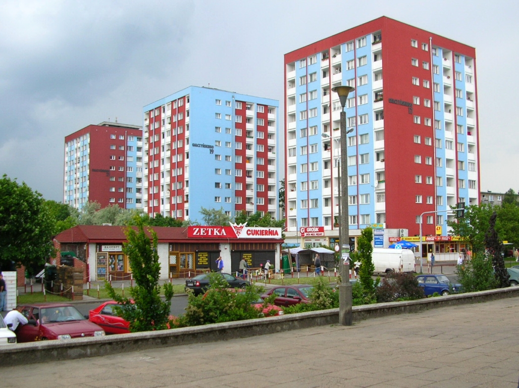 Osiedle Błonie w Bydgoszczy